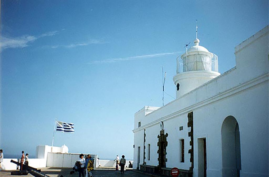 Citadelle Montevideo sur les hauteurs de la ville